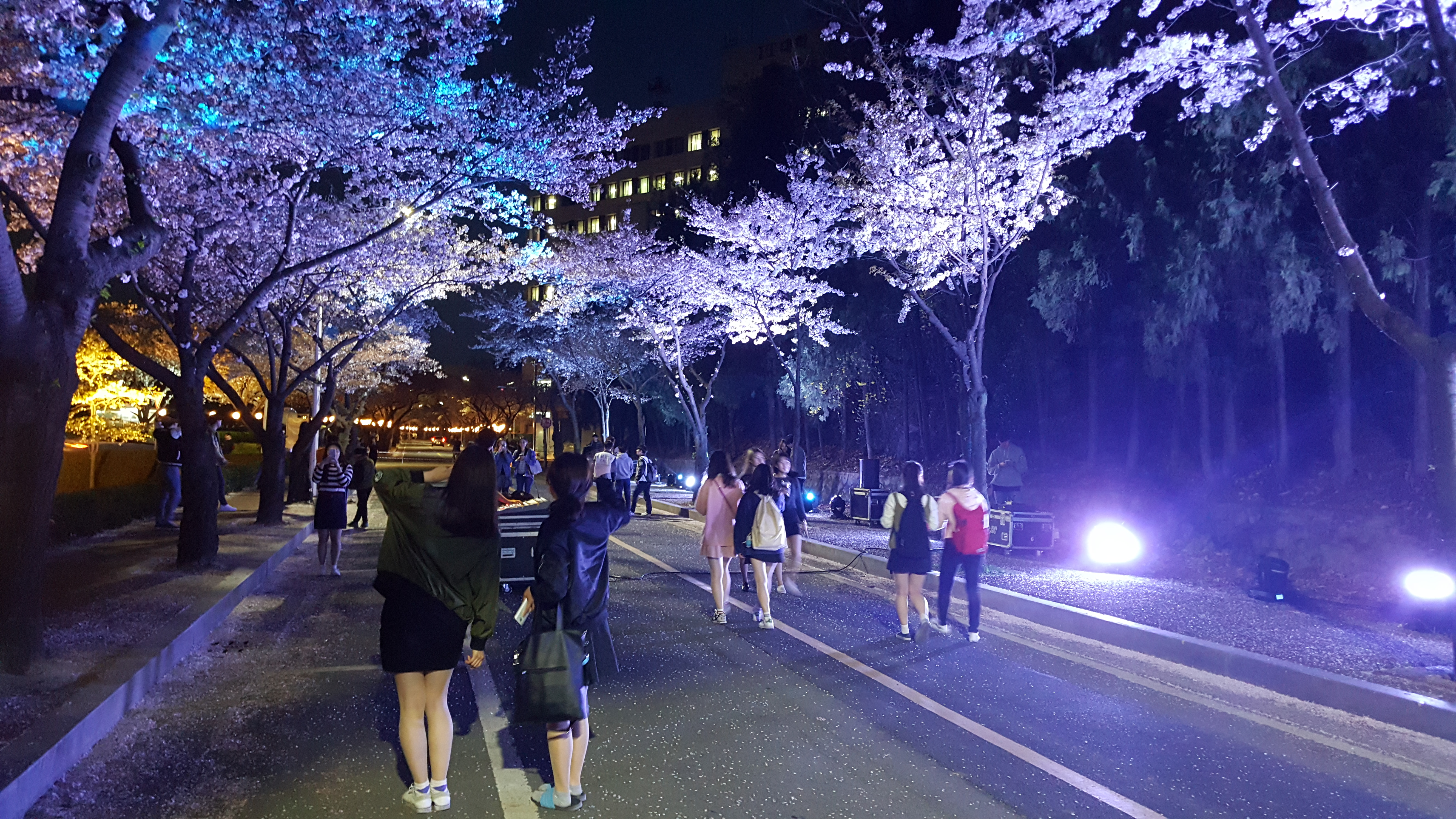 2016년 4월 경북대학교 벚꽃축제